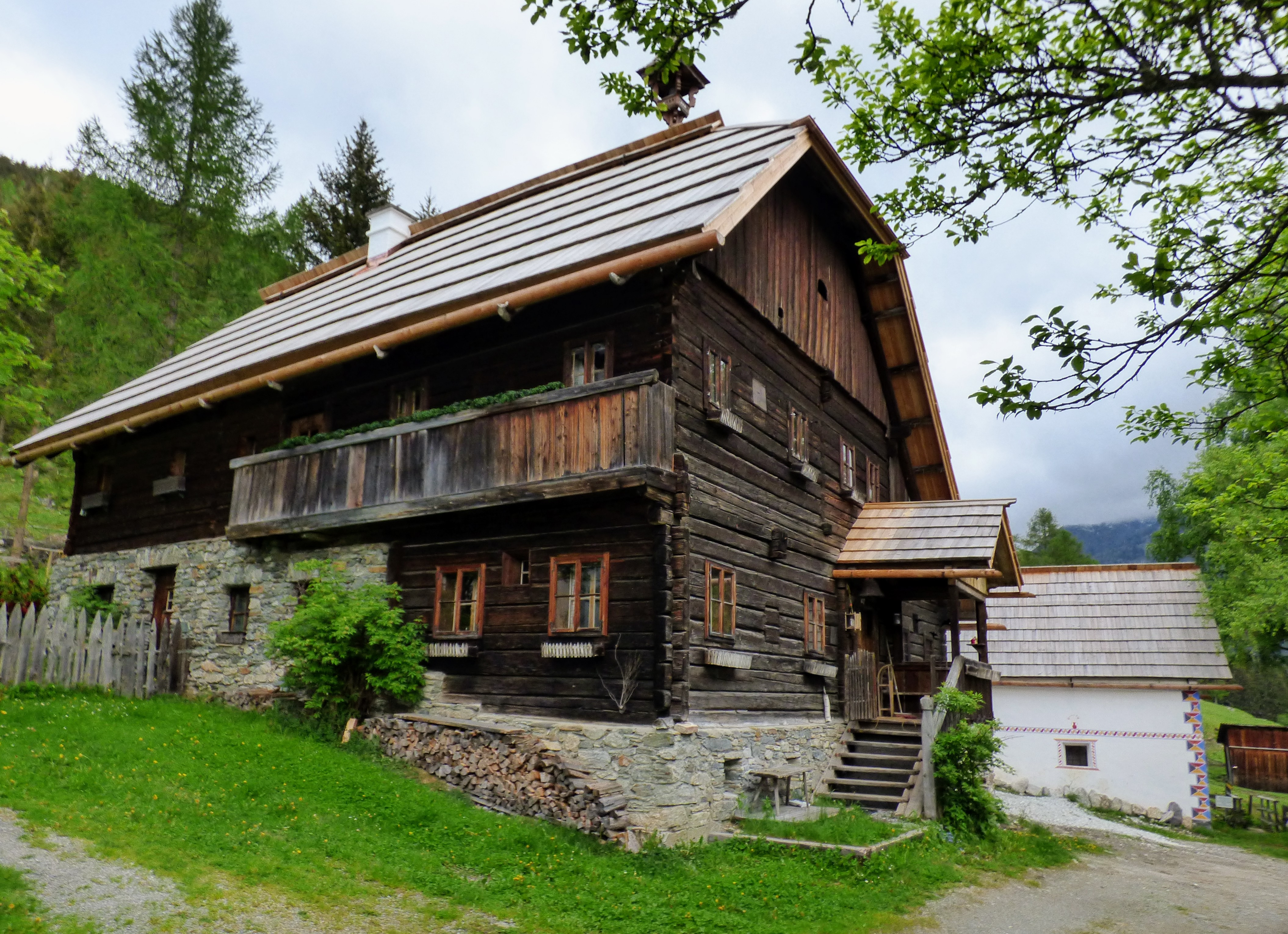 Messnerhaus Sankt Rupert (Gde. Weißpriach, Salzburg), dahinter Fuchshof-Kasten